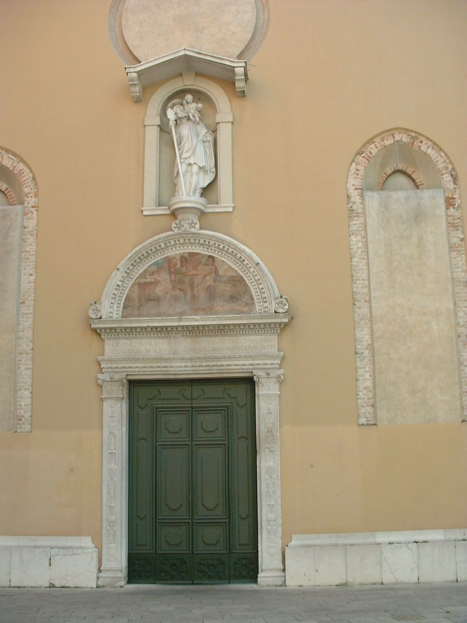 Udine, chiesa di S. Cristoforo, portale scolpito da Bernardino da Bissone